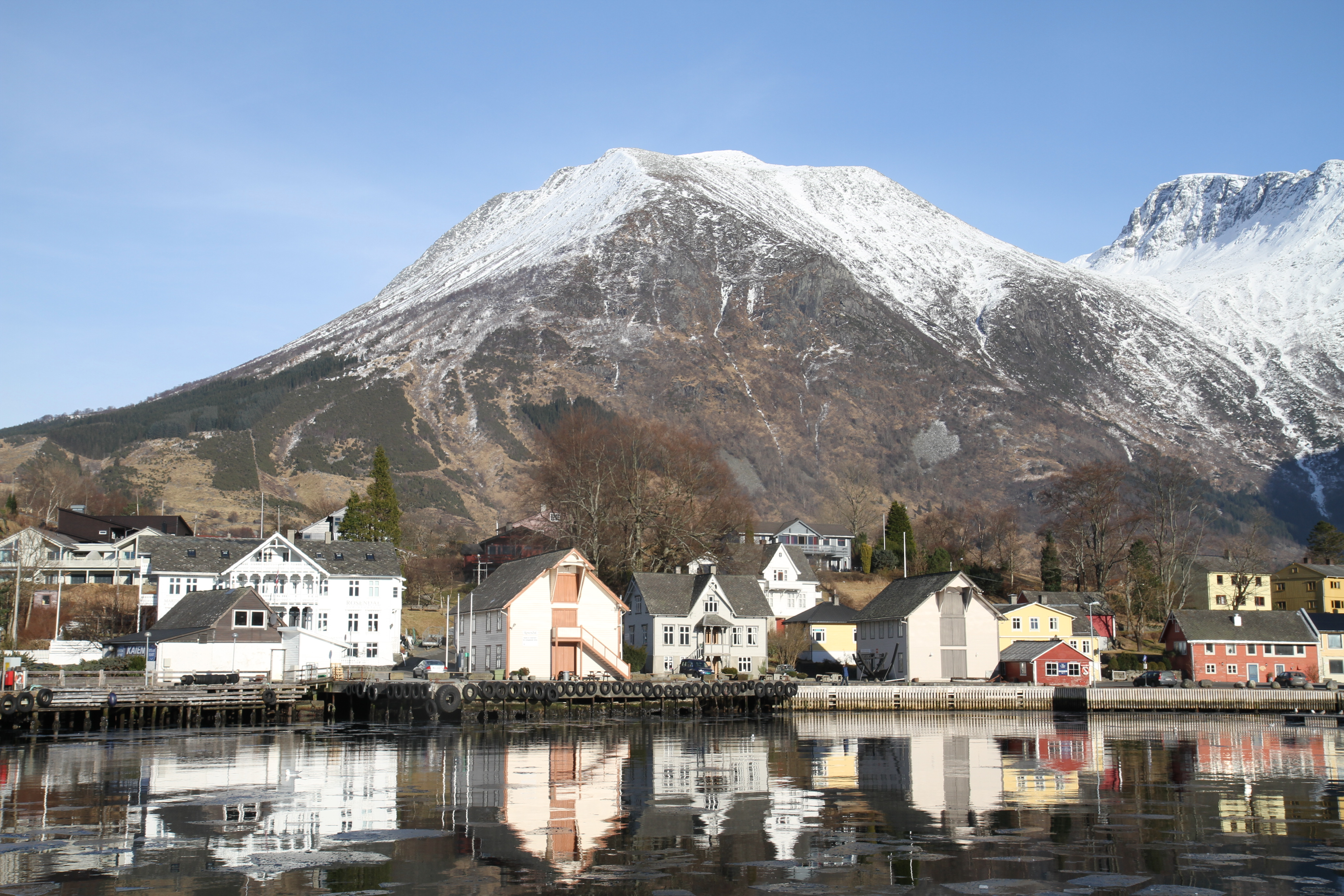 Melderskin (t.v.) ragar høgt over Rosendal. Saman med Laurdal og Laurdalstind utgjer Melderskin ein vidgjeten fjellformasjon.